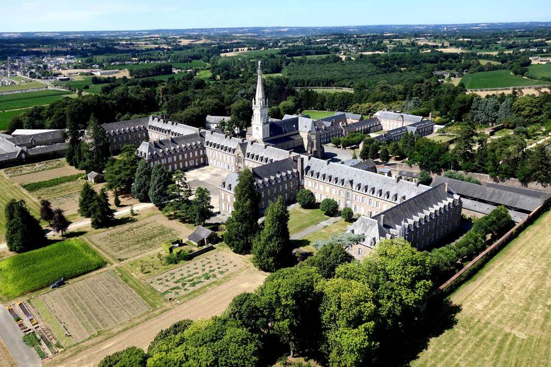 La Tour Saint Joseph, Maison-Mère des Petites Sœurs des Pauvres (35190 Saint-Pern). Photo par Alain Sébille.